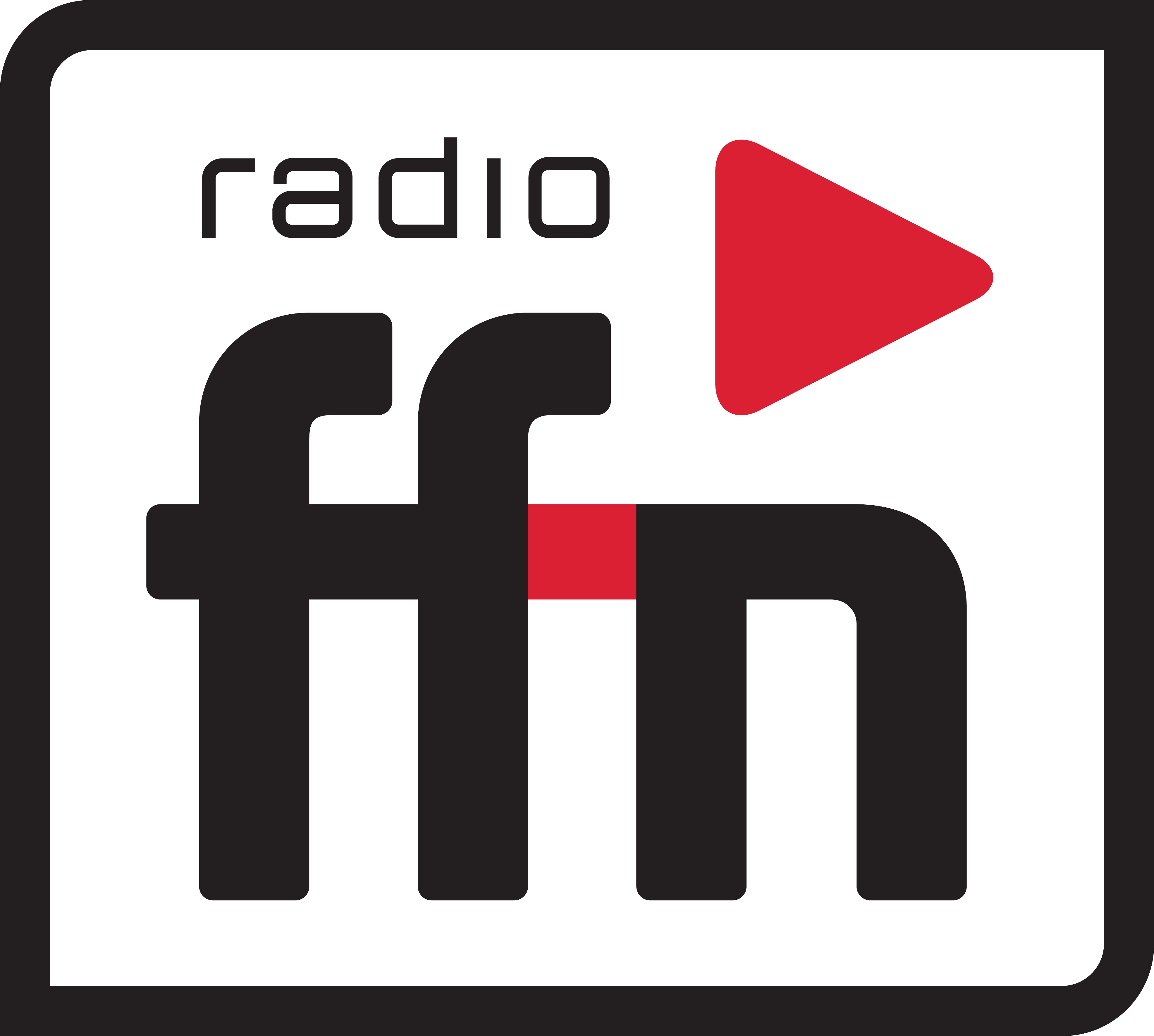 neues Logo radio ffn